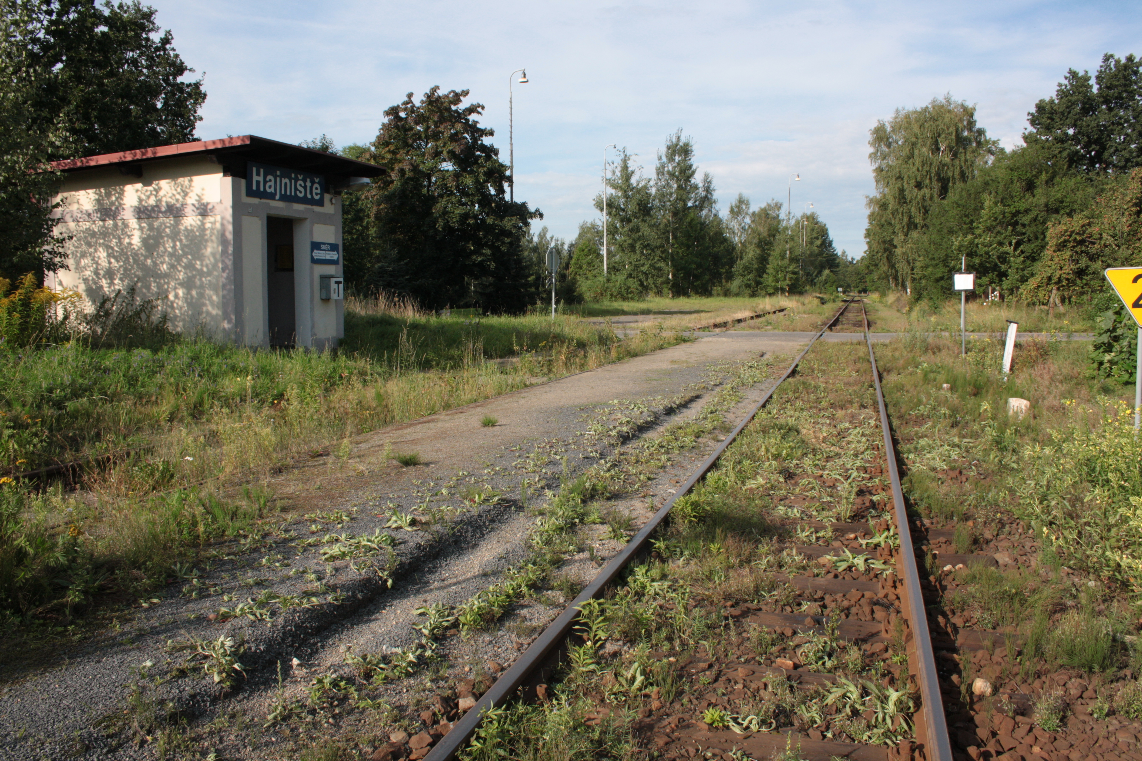 This photograph was taken with a DSLR from WMCZ's Camera grant. Železniční zastávka v Hajništi (pohled směr Frýdlant).